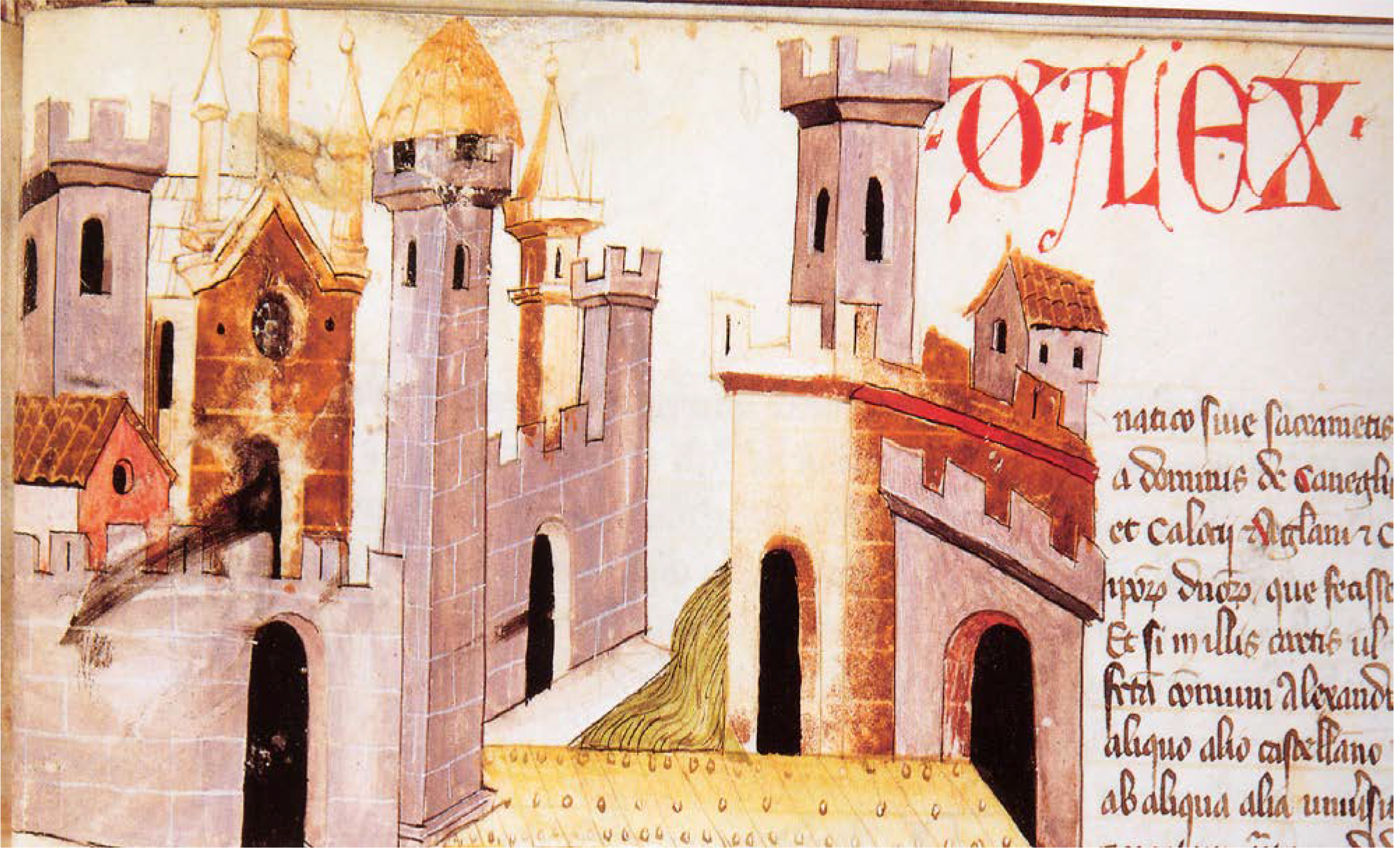 Immagine allegorica della città di Alessandria e di Bergoglio con in primo piano il ponte in legno sul fiume Tanaro. Sulla sinistra è riconoscibile la facciata dell’antica cattedrale di Alessandria, demolita da Napoleone nel 1803. Miniatura anonima del Codex Astensis qui Malabayla communiter nuncupatur, XI-XII secolo